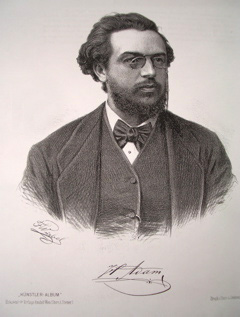 Heinrich Adam Adolf Eckstein Künstler-Album 1889